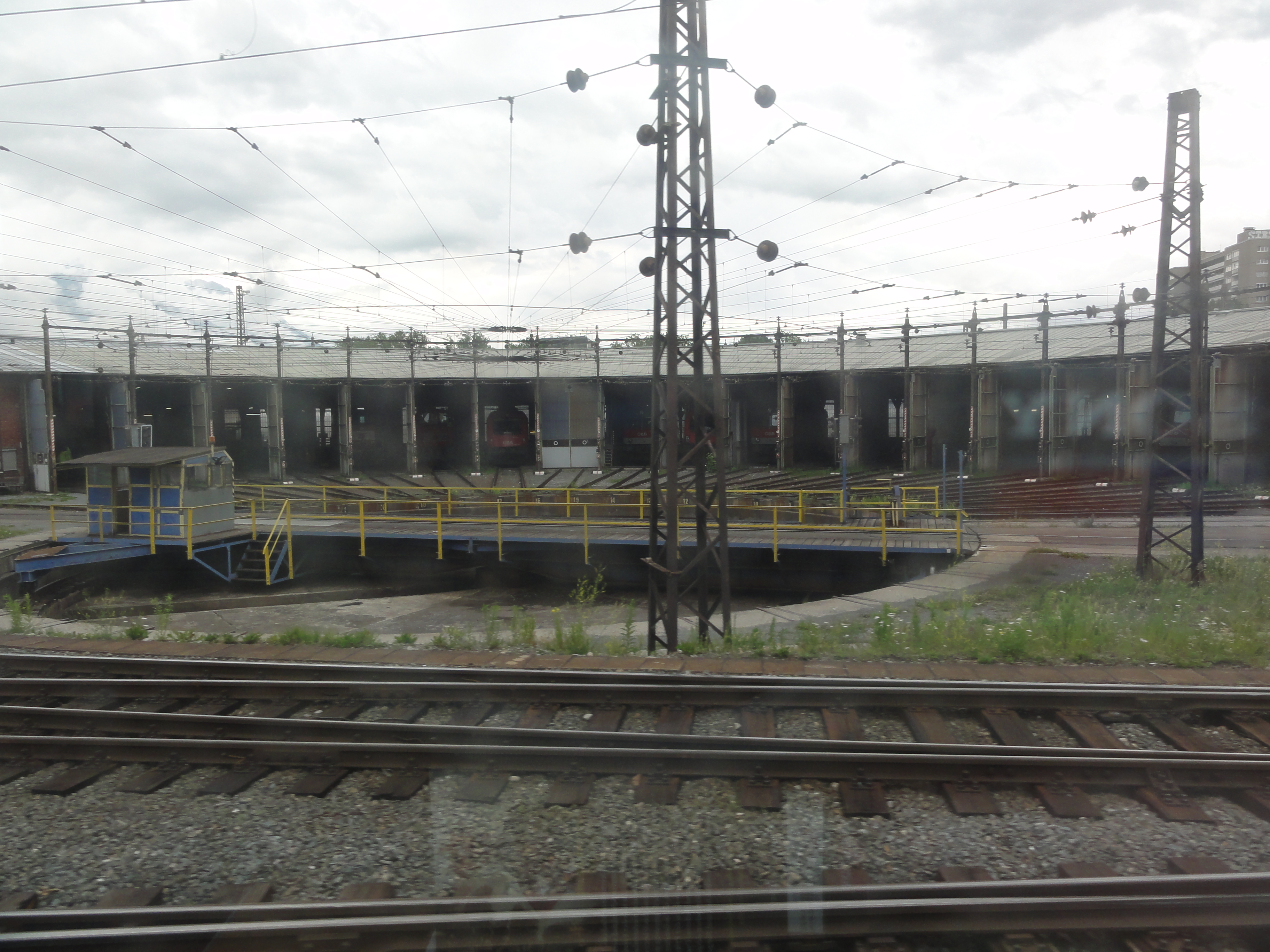 Innsbruck Hauptbahnhof — Lokschuppen